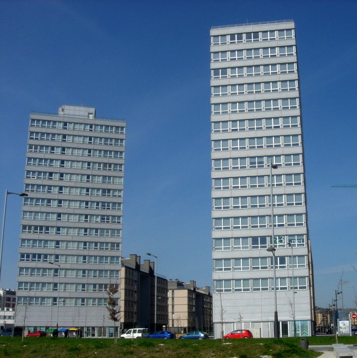 Salburuko auzo berria